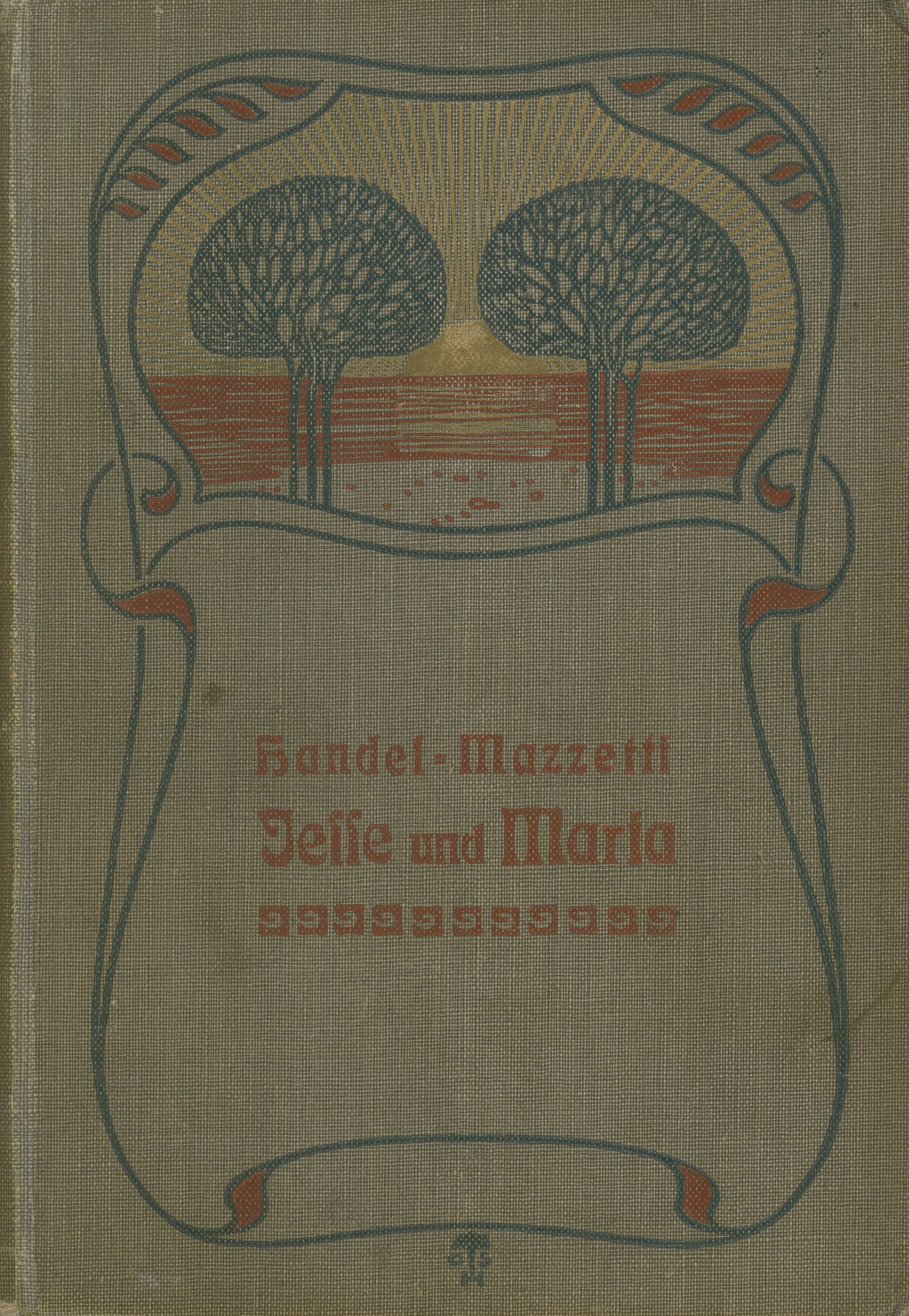 Enrica von Handel-Mazzetti: Jesse und Maria. Ein Roman aus dem Donaulande. Kösel Verlag, Kempten und München 1909, Vierzehntes und fünfzehntes Tausend